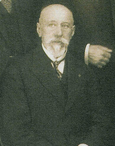 Jean-Baptiste Cooreman - bestendig afgevaardige provincie Oost-Vlaanderen - België